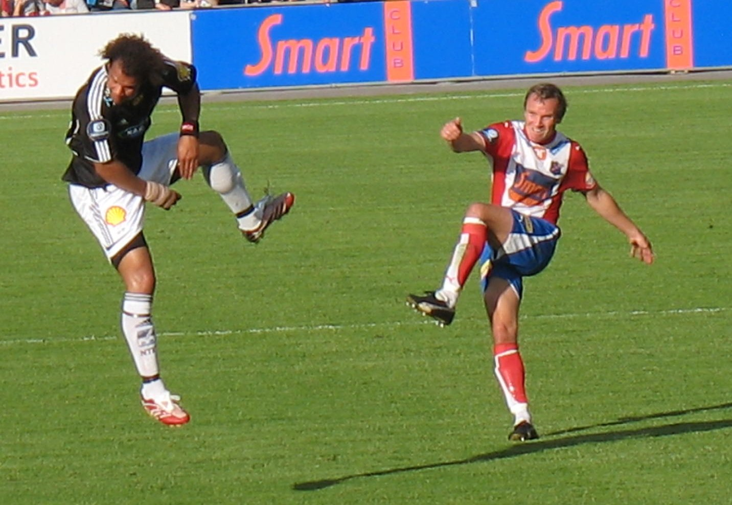 Fotballspillerene Daniel Braathen og Ståle Stensaas